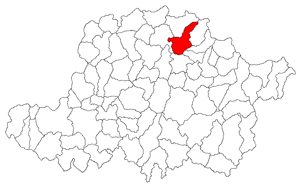 Categorie:Hărţi ale judeţului Arad